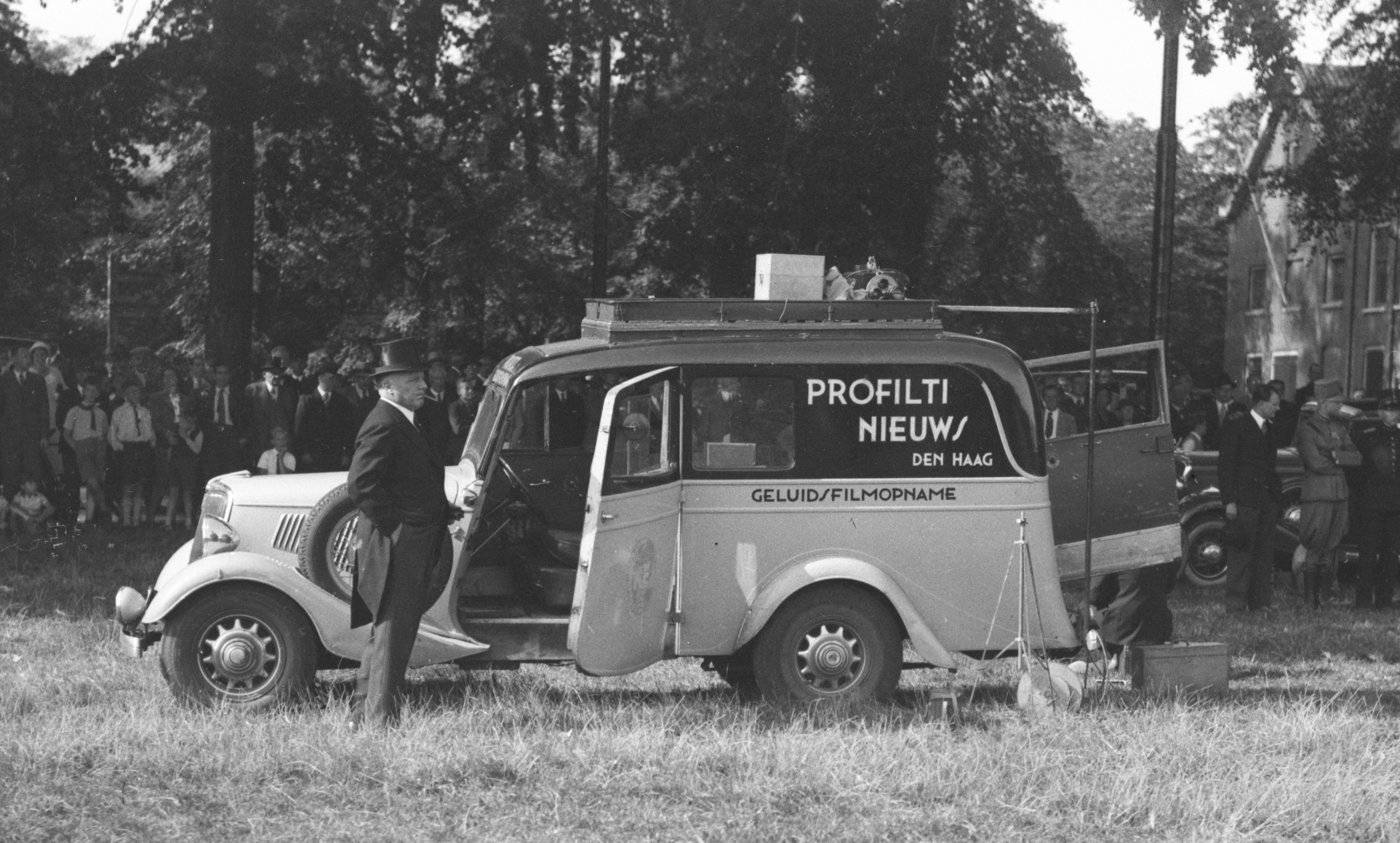 Bijeenkomst van de B.V.L. (Bijzondere Vrijwillige Landstorm) ter gelegenheid van het 20-jarig bestaan. Op het Malieveld? naast het terrein van de Dierentuin staat een auto van Profilti Nieuws voor het maken van geluidsfilm opnamen. Op de achtergrond het Boorhuis aan de Boorlaan. [Op dezelfde dag hield de B.V.L. bij het Paleis Huis ten Bosch ook een defilé voor H.M. koningin Wilhelmina ter gelegenheid van haar 40-jarig regeringsjubileum]